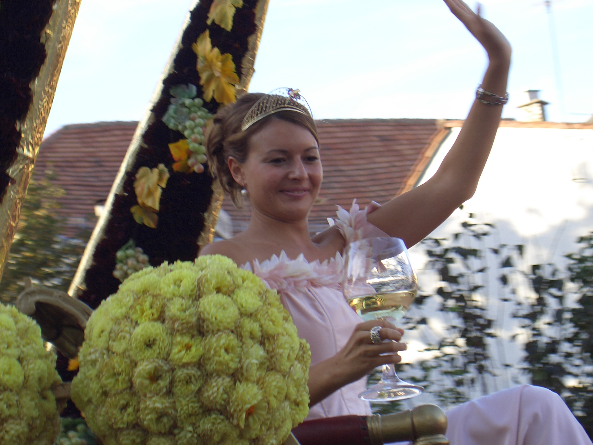 Katja Schweder beim Winzerfestzug in Neustadt an der Weinstraße, zwei Tage nach ihrer Wahl zur Deutschen Weinkönigin